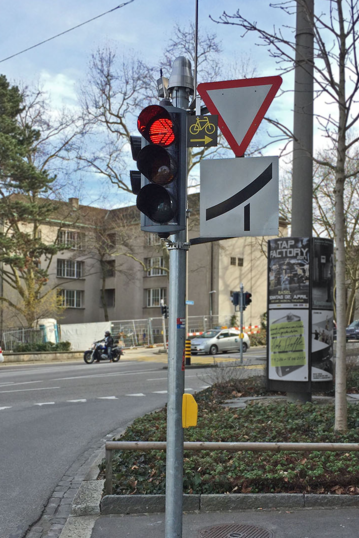 Beschilderung »Rechtsabbiegen für Radfahrer frei« in Basel als Teil des Pilotversuchs »velofreundliche Lichtsignalanlagen«